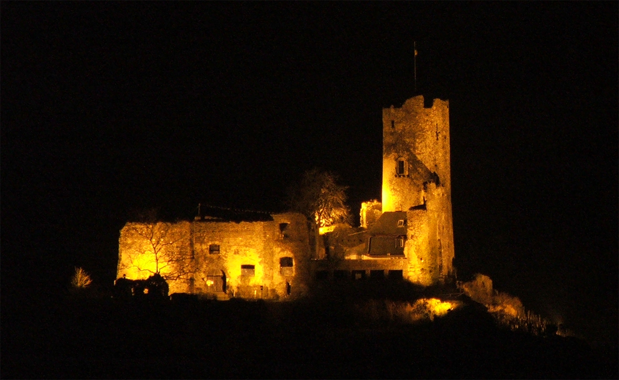 Burgruine Landshut bei Nacht